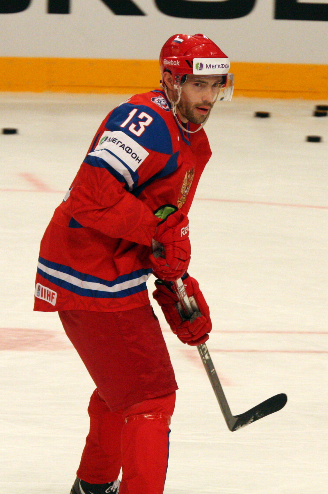 Павел Дацюк, разминка перед матчем Россия-Швеция, 11.05.2012, Стокгольм, Швеция